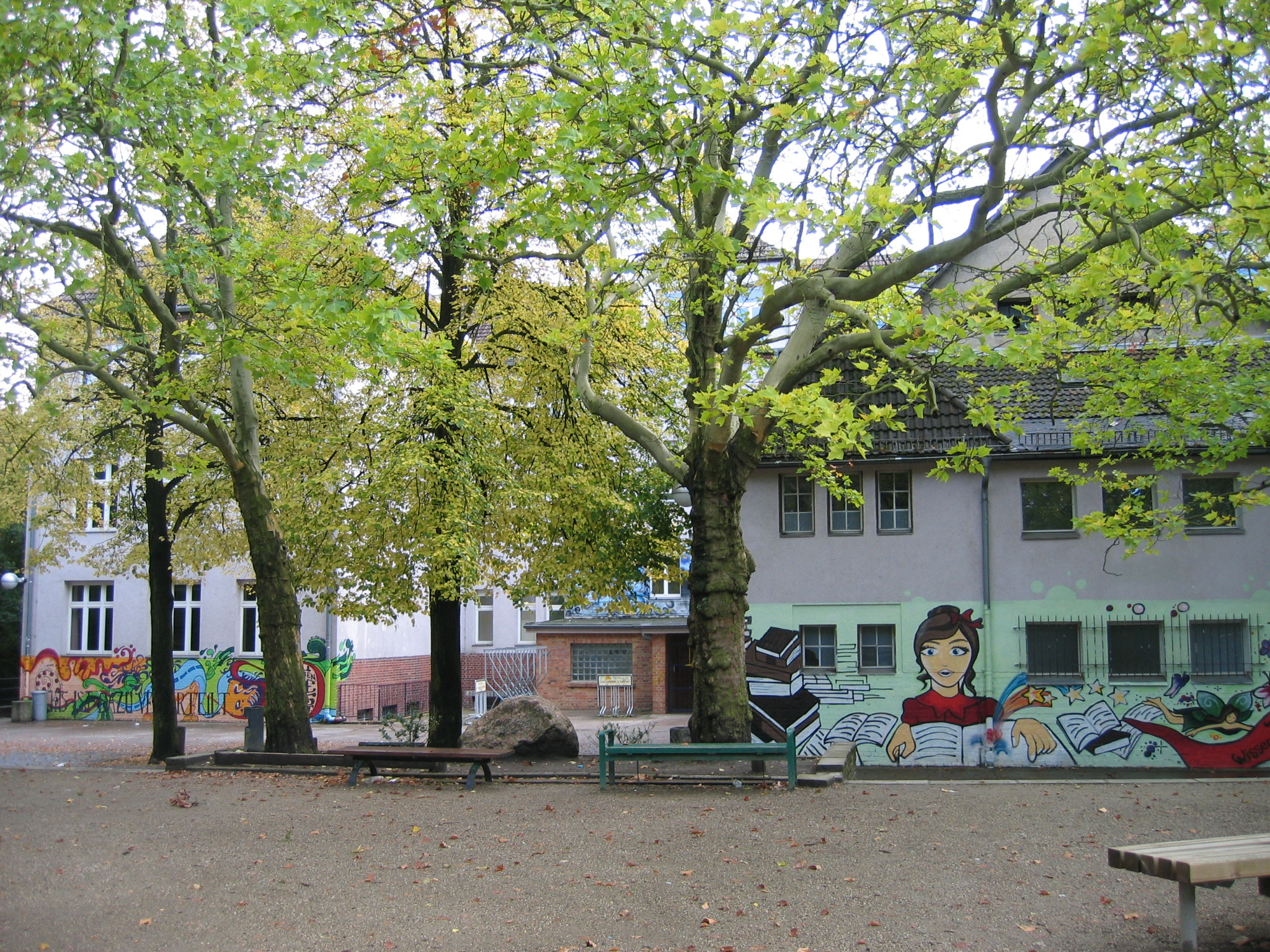 Otto-Nagel-Gymnasium, Berlin